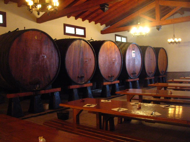 Sagardotegi baten barnealdea.